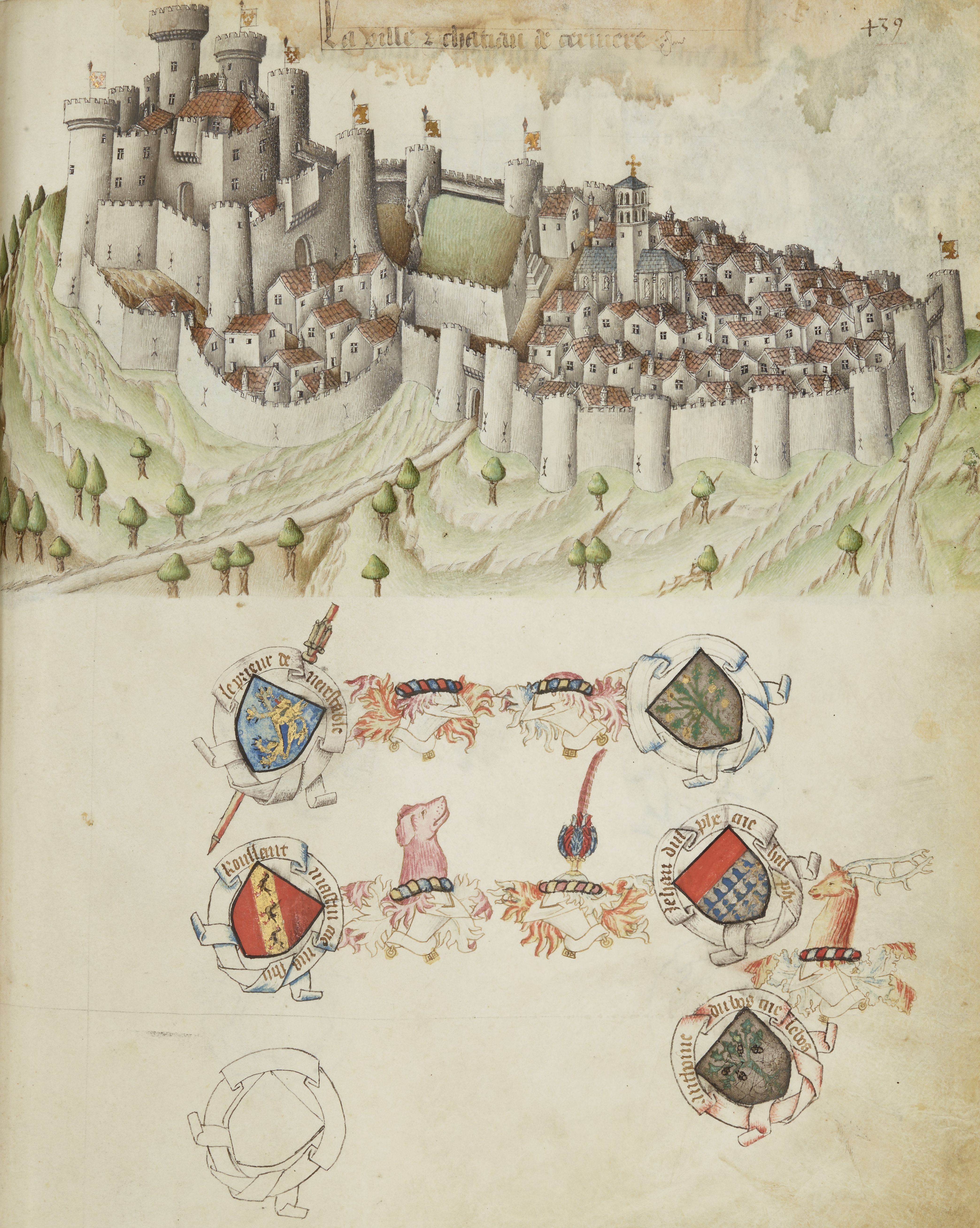 Ville et château de Cervières, relevé du Armorial d'armes pour Gaignières.